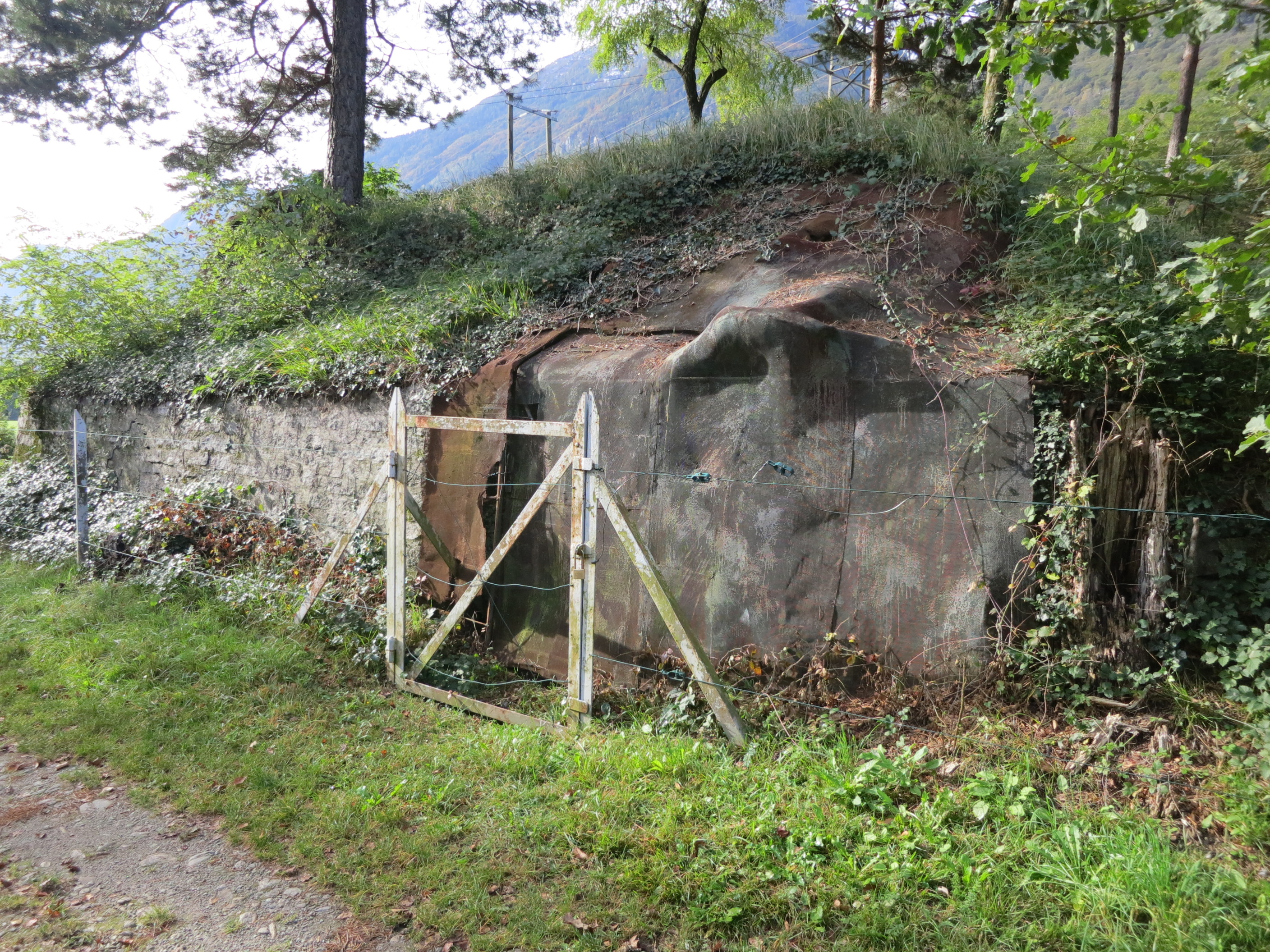 Artilleriewerk Lona, Iragna TI, Schweiz